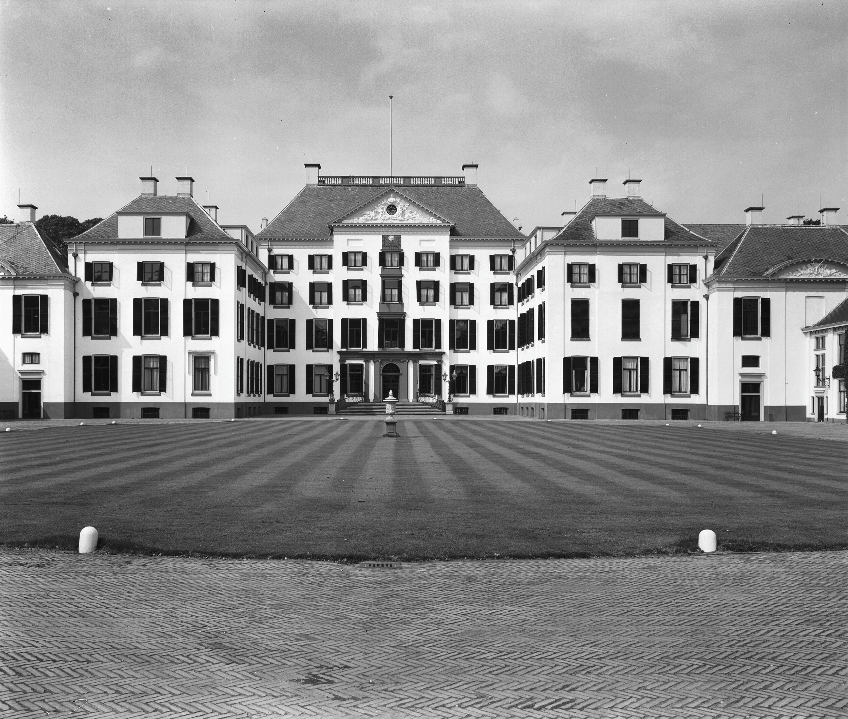 Paleis "Het Loo": exterieur